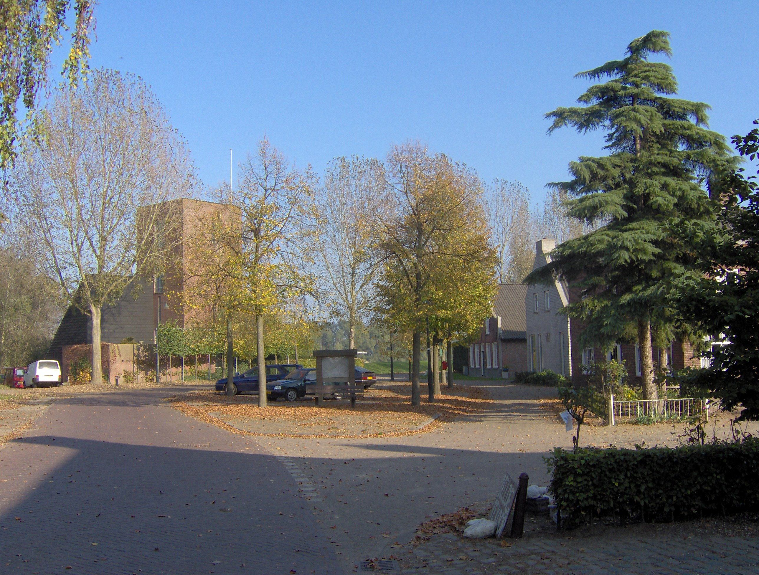 eigen foto Licensing categorie:afbeelding 's-Hertogenbosch